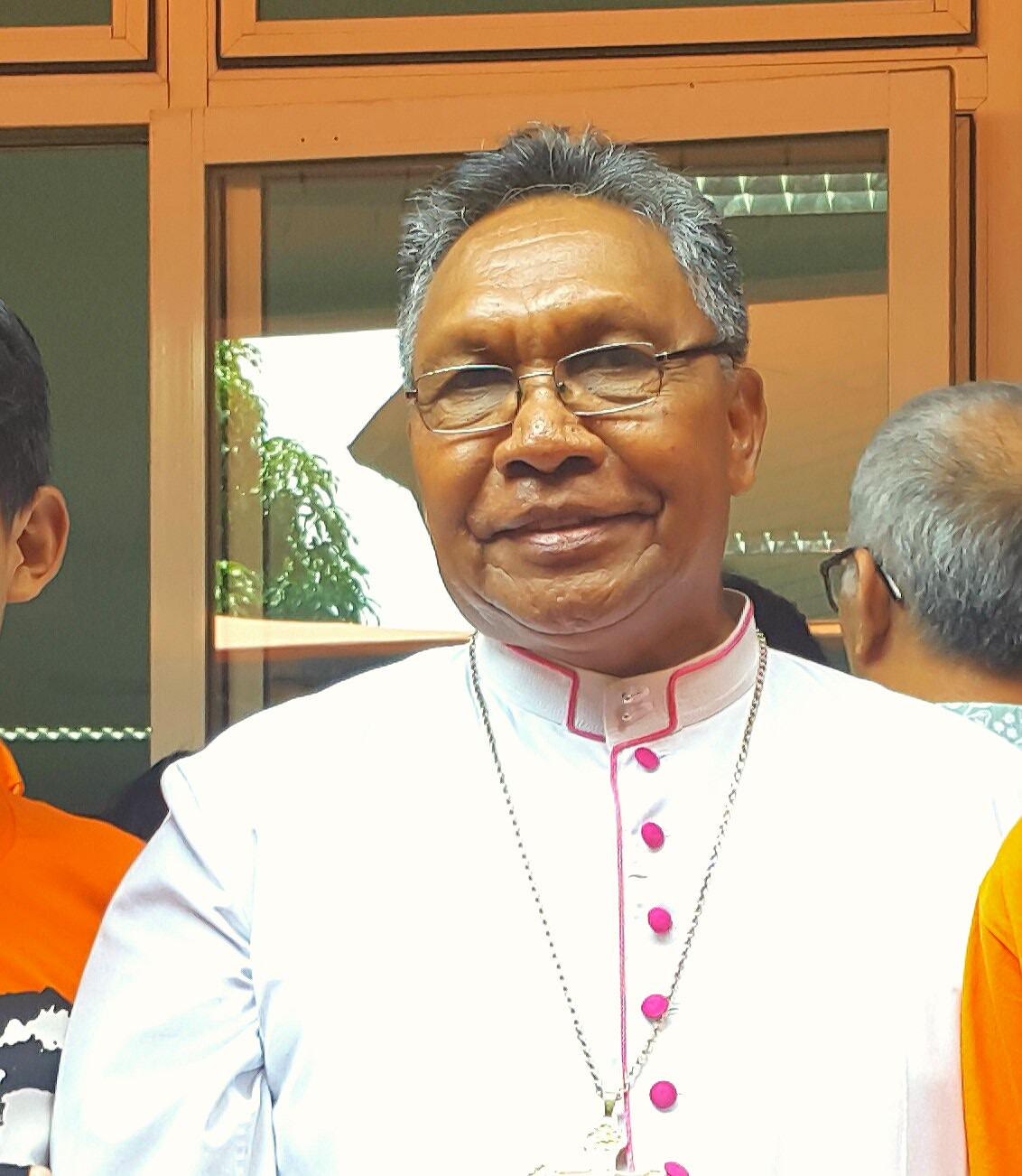 Mgr Edmund Woga, Uskup Weetebula